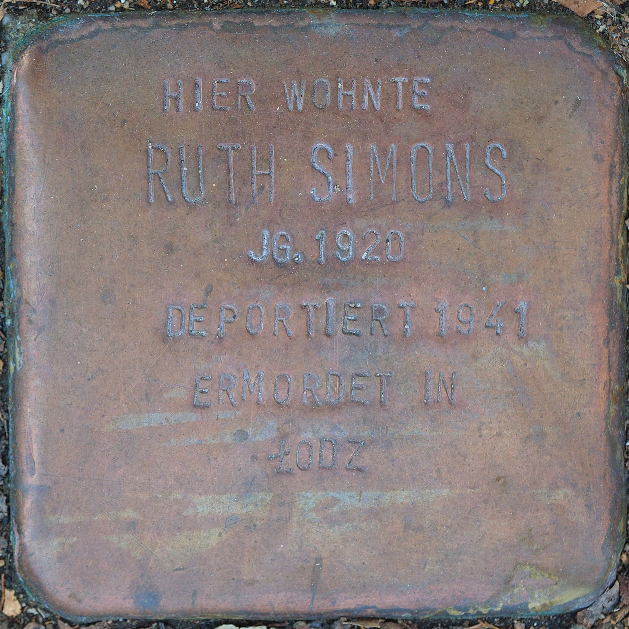 Stolperstein VIE: Simons, Ruth